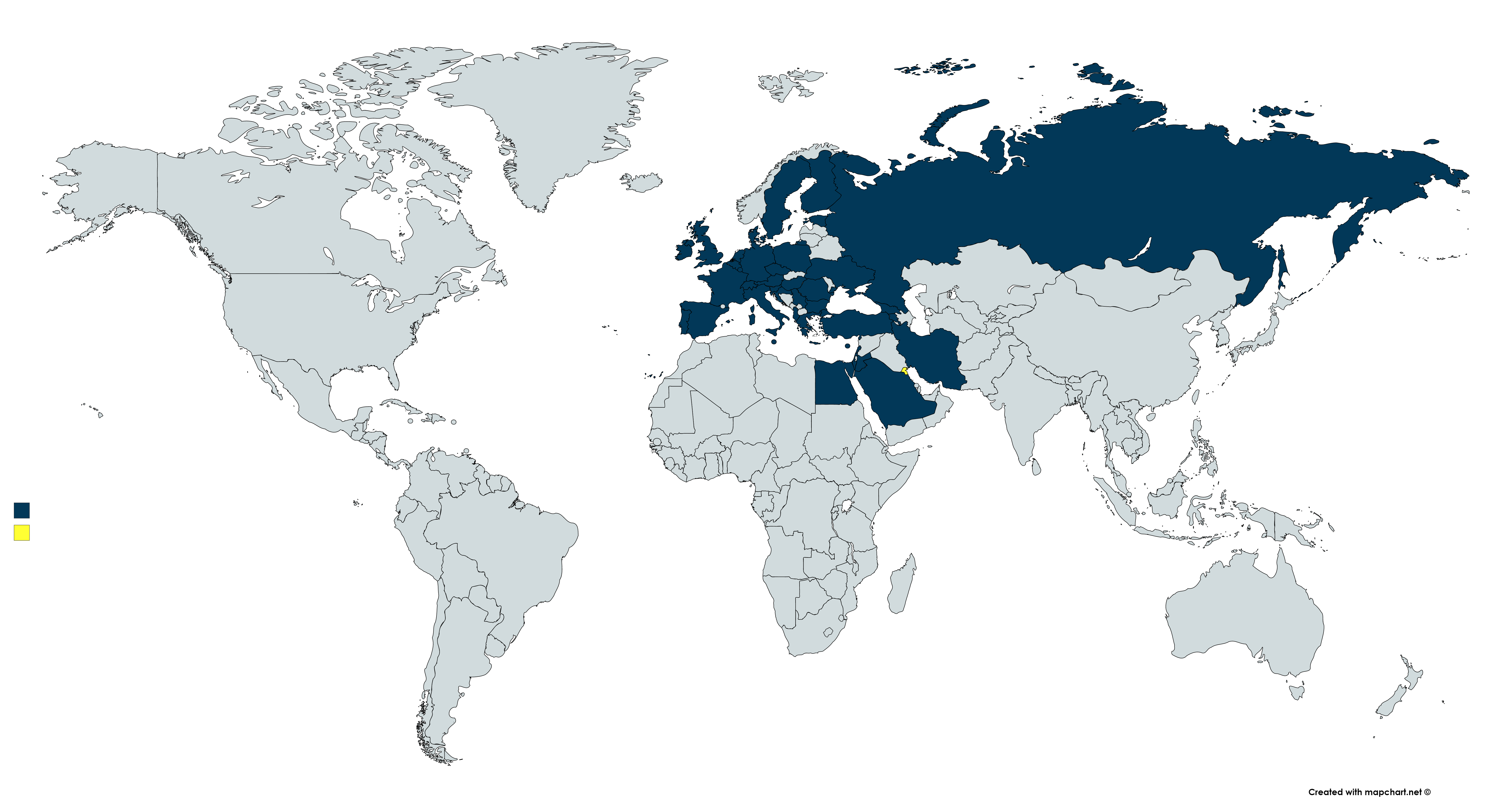 Aegean Airlinesi sihtriigid tumesinisega ja tulevane/ tulevased sihtriigid kollasega